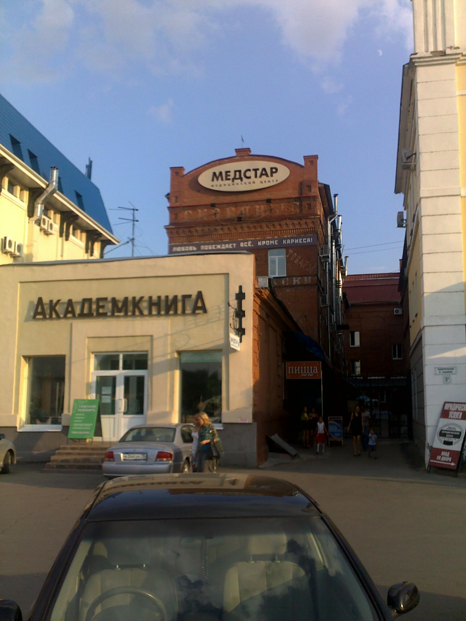 Librovendejo "Akademkniga" en Tomsko, Rusio.